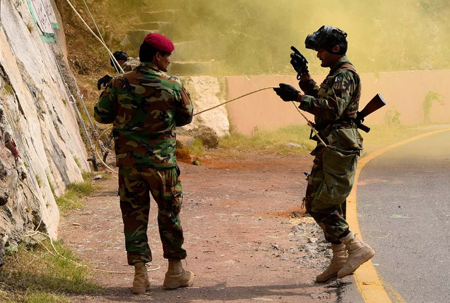 Первая совместная тренировка по горной подготовке в рамках российско-пакистанского тактического учения «Дружба-2016»